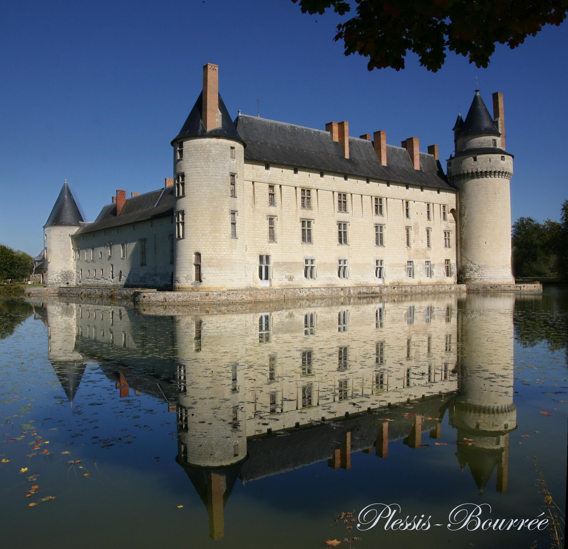 Schloss Plessis-Bourré